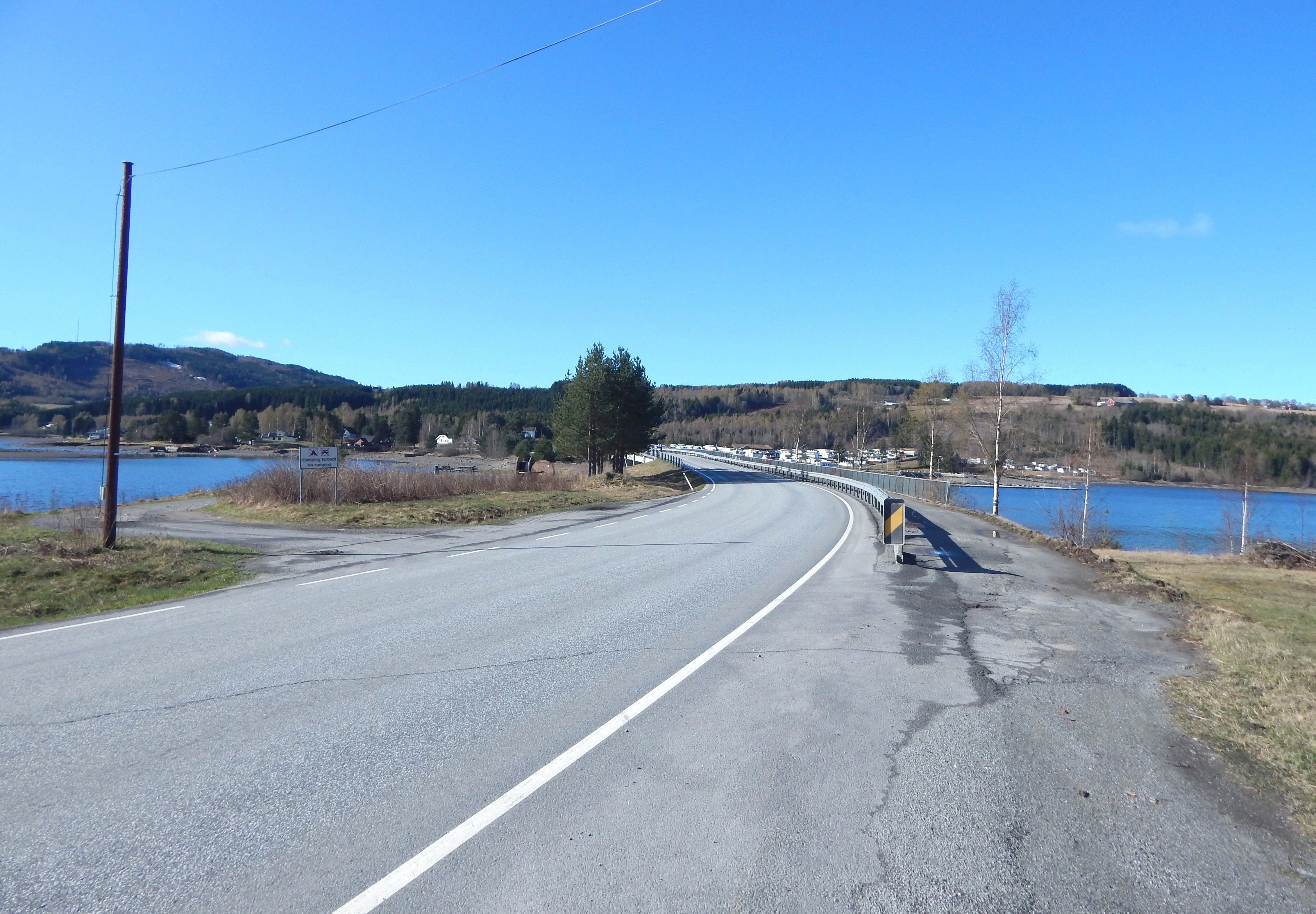 Primær fylkesvei 212 ved Pellervika, med Framnesbrua over Furnesfjorden